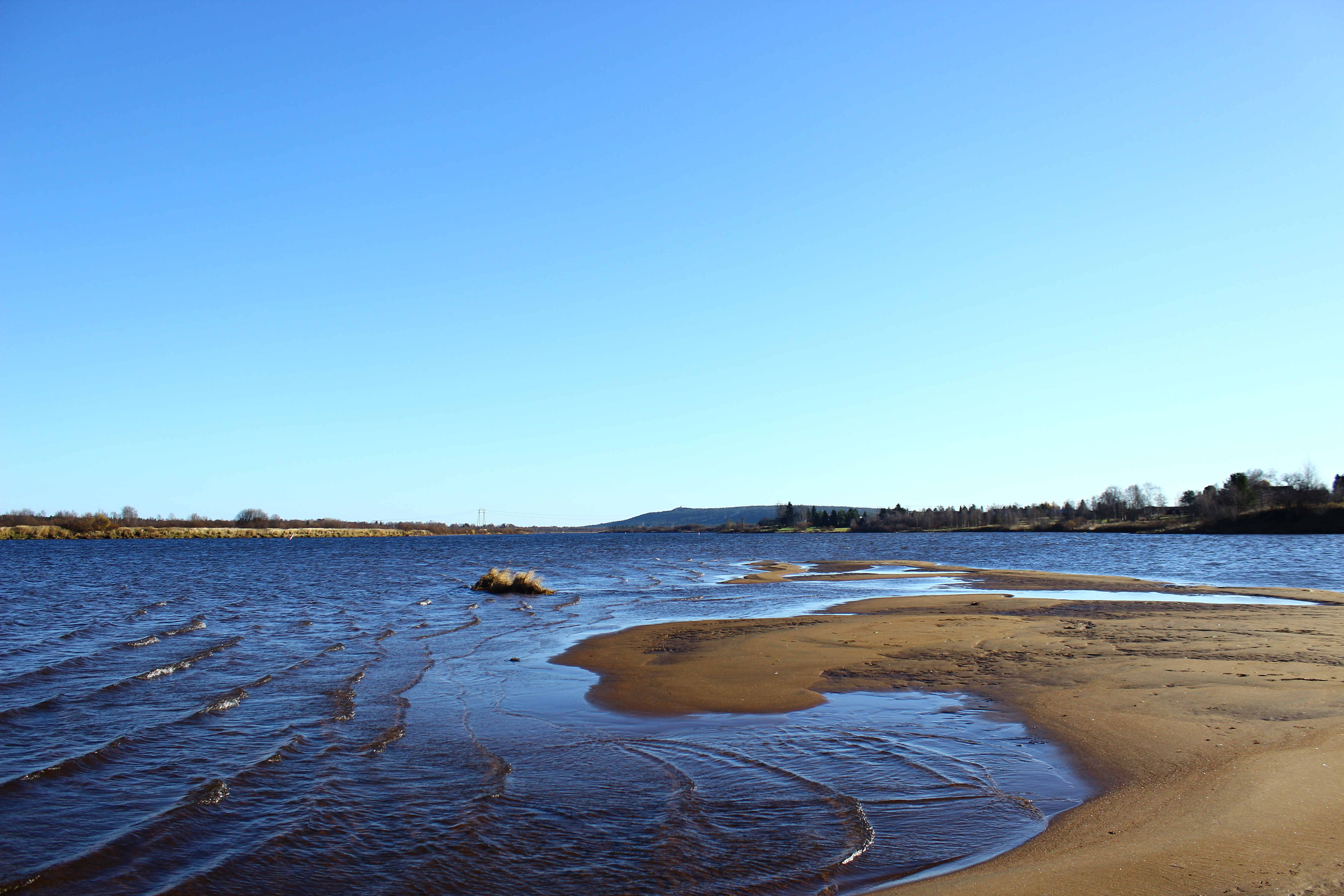 Ounasjoki Rovaniemellä Ylikylän kohdalla